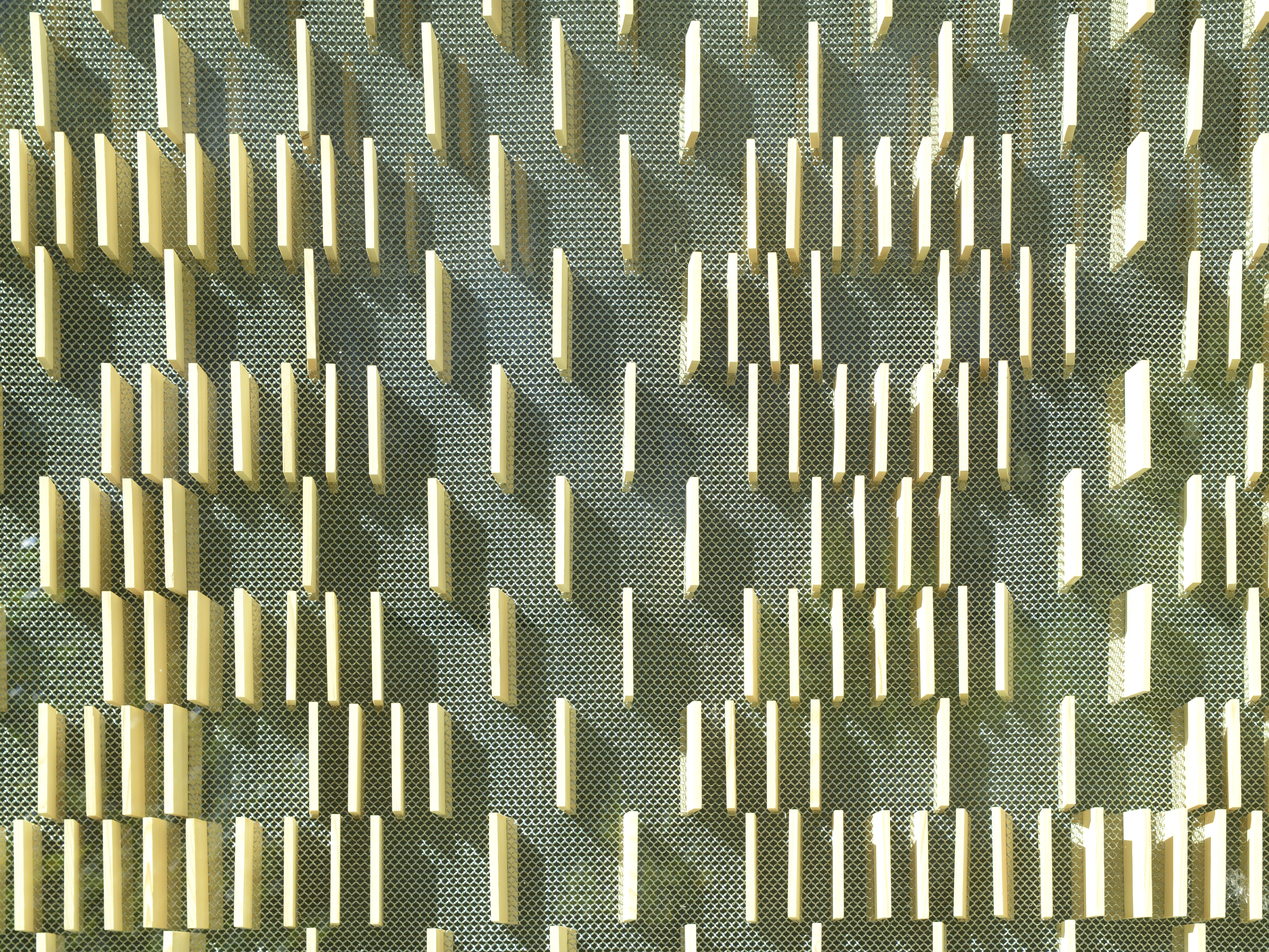 Qibla-Wand der Künstlerin Azra Akšamija, Muslimischer Friedhof an der Robert-Koch-Straße 18a, in Altach.